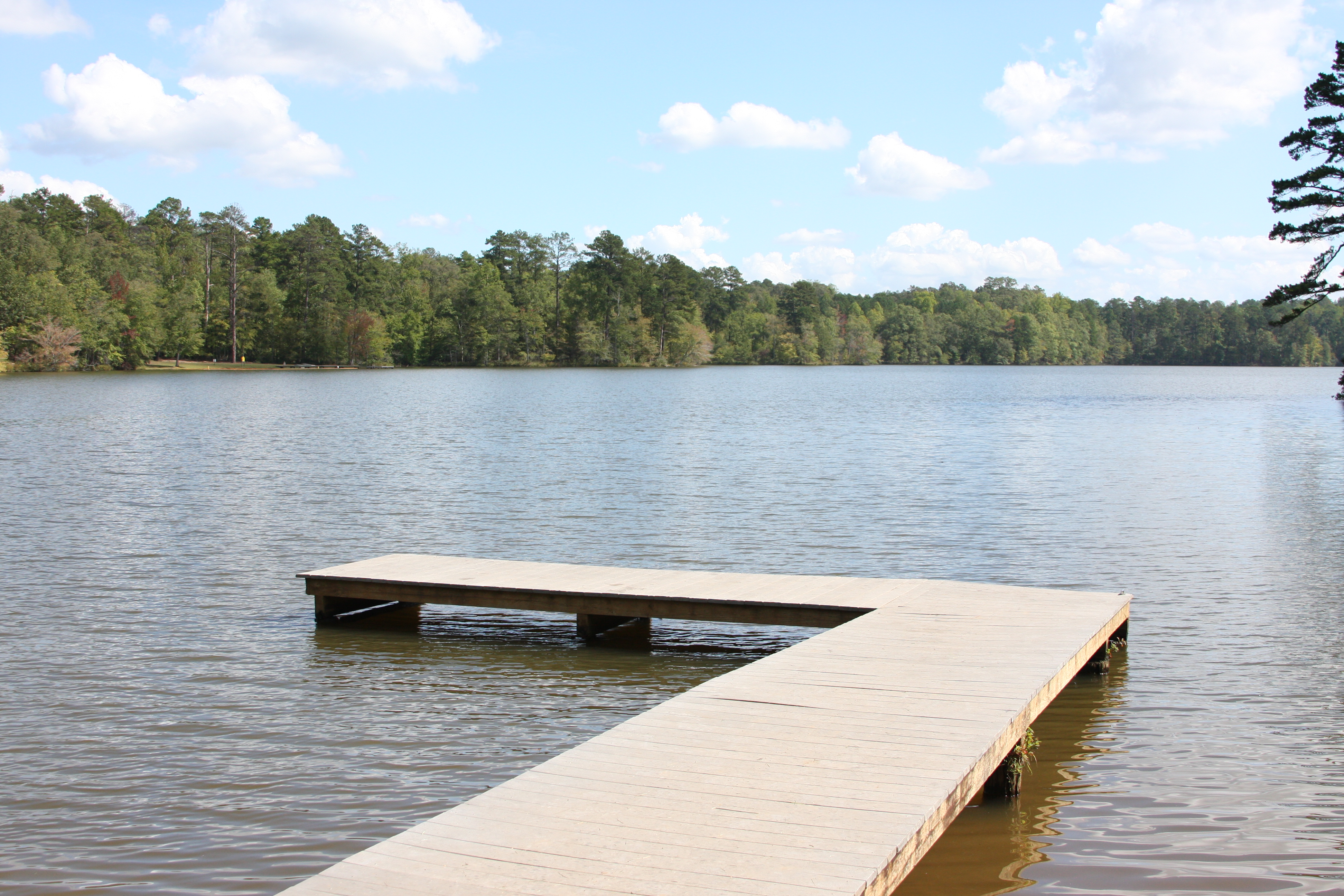 Lake Rutledge